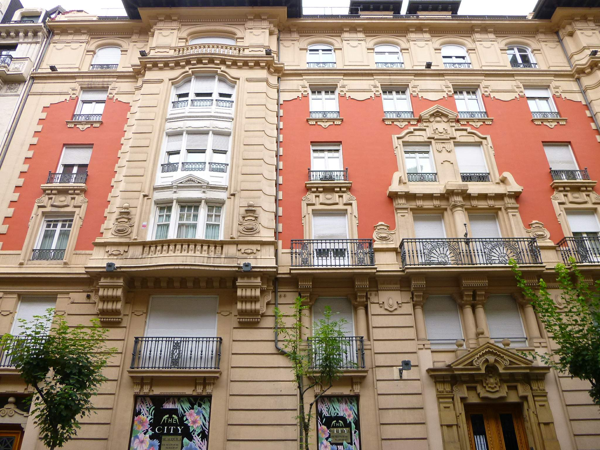 Calle Ercilla (Bilbao)